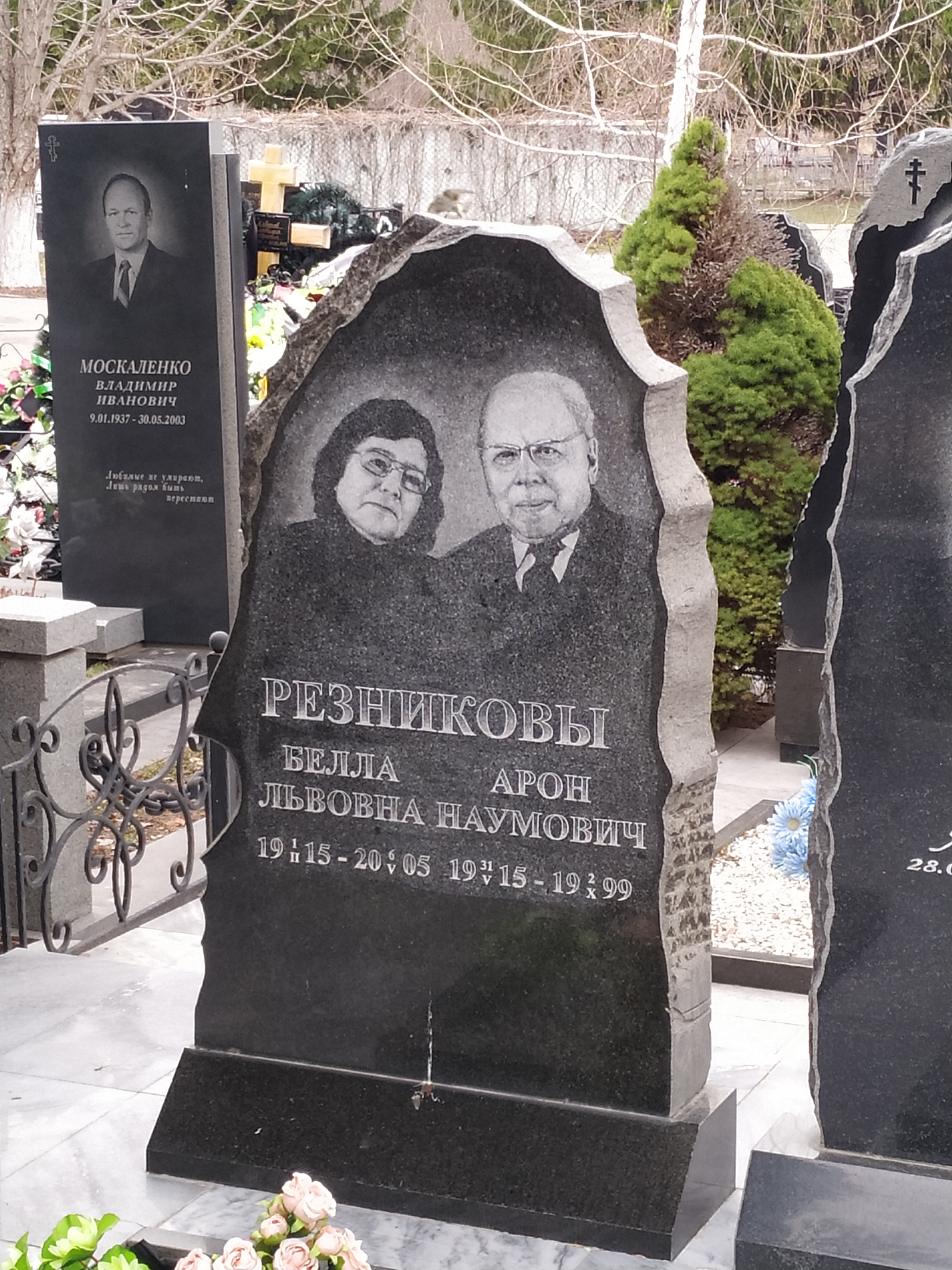 Могила Арона Наумовича Резникова, его жены и дочери. Баныкинское кладбище, Тольятти, Россия